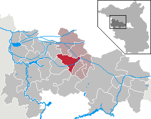 Mühlenberge in Brandenburg (Country) - District Havelland